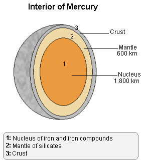 Descripción: Vista de interior del planeta Mercurio. Autor: Lmb. Estatus de copyright: Libre. Enlaces relacionados: Mercurio.